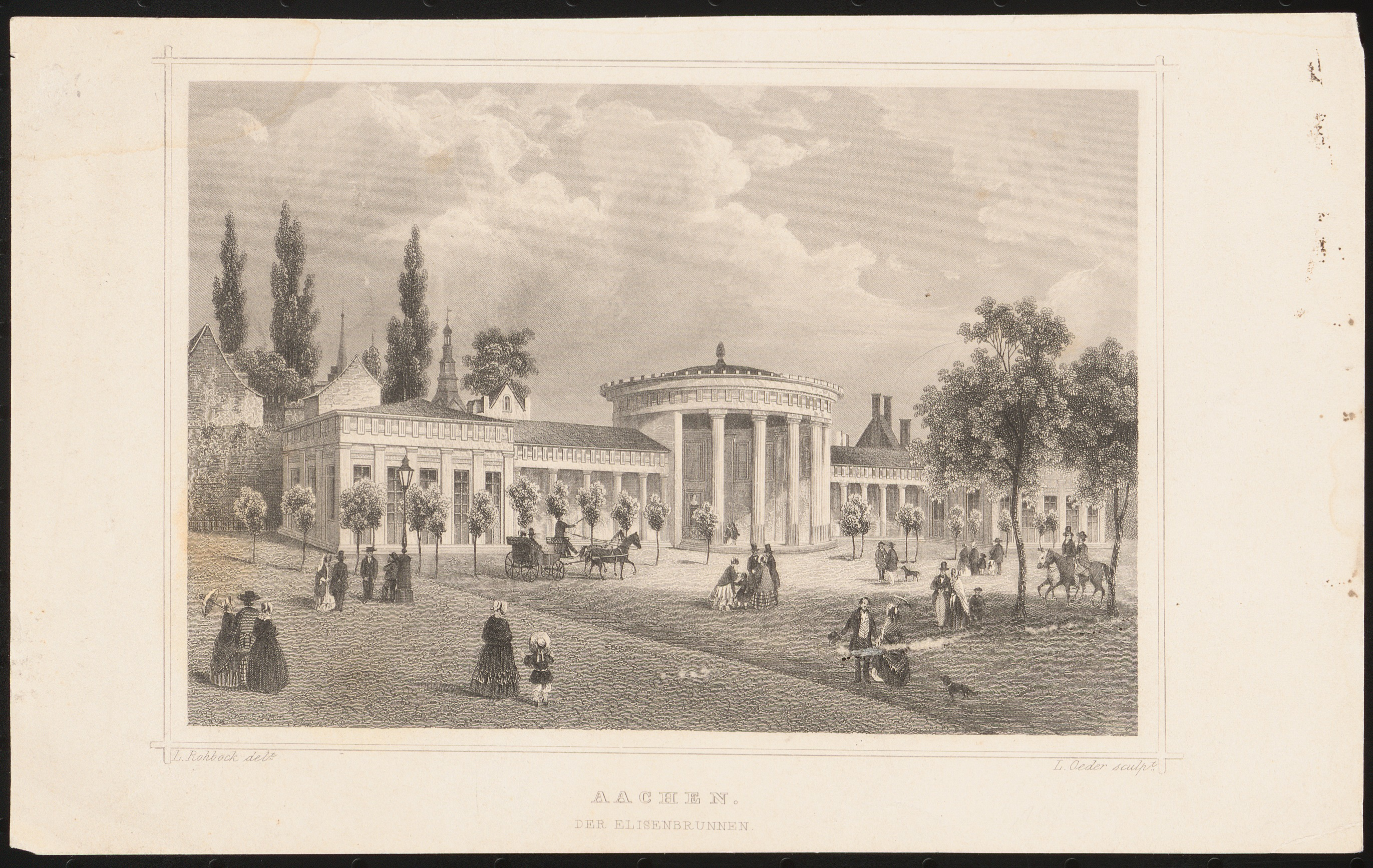 Cremer Johann Peter (1785-1863), Elisenbrunnen, Aachen: Ansicht der Vorderseite. Druck auf Papier, 14,7 x 23,2 cm (inkl. Scanrand). Architekturmuseum der Technischen Universität Berlin Inv. Nr. 46071.